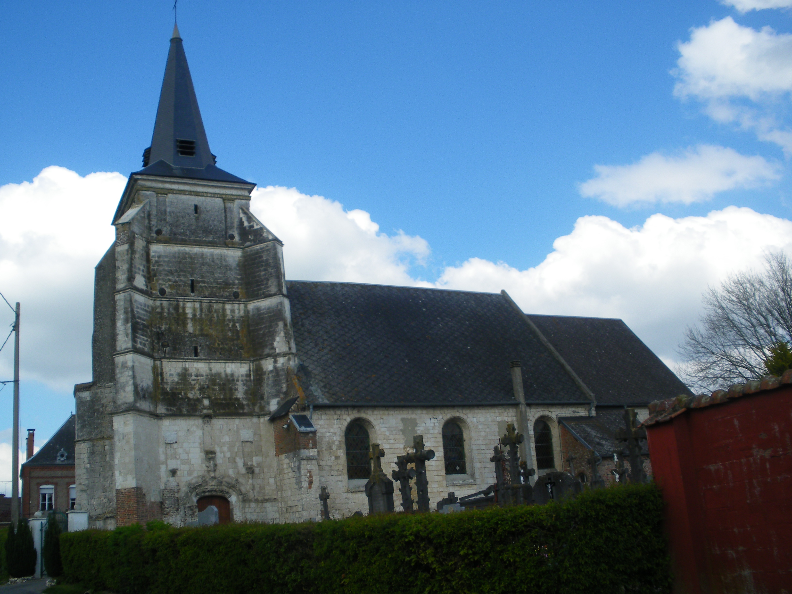 Vue de l'église Saint-Jean-Baptiste de Villers-l'Hôpital.